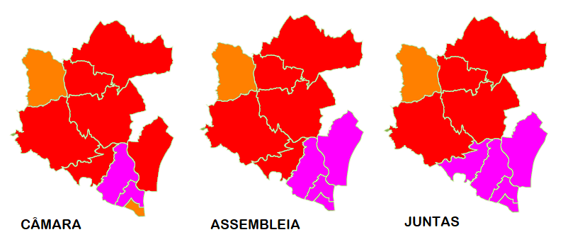 Mapa ilustrativo do partido mais por freguesia em Loures (2017)